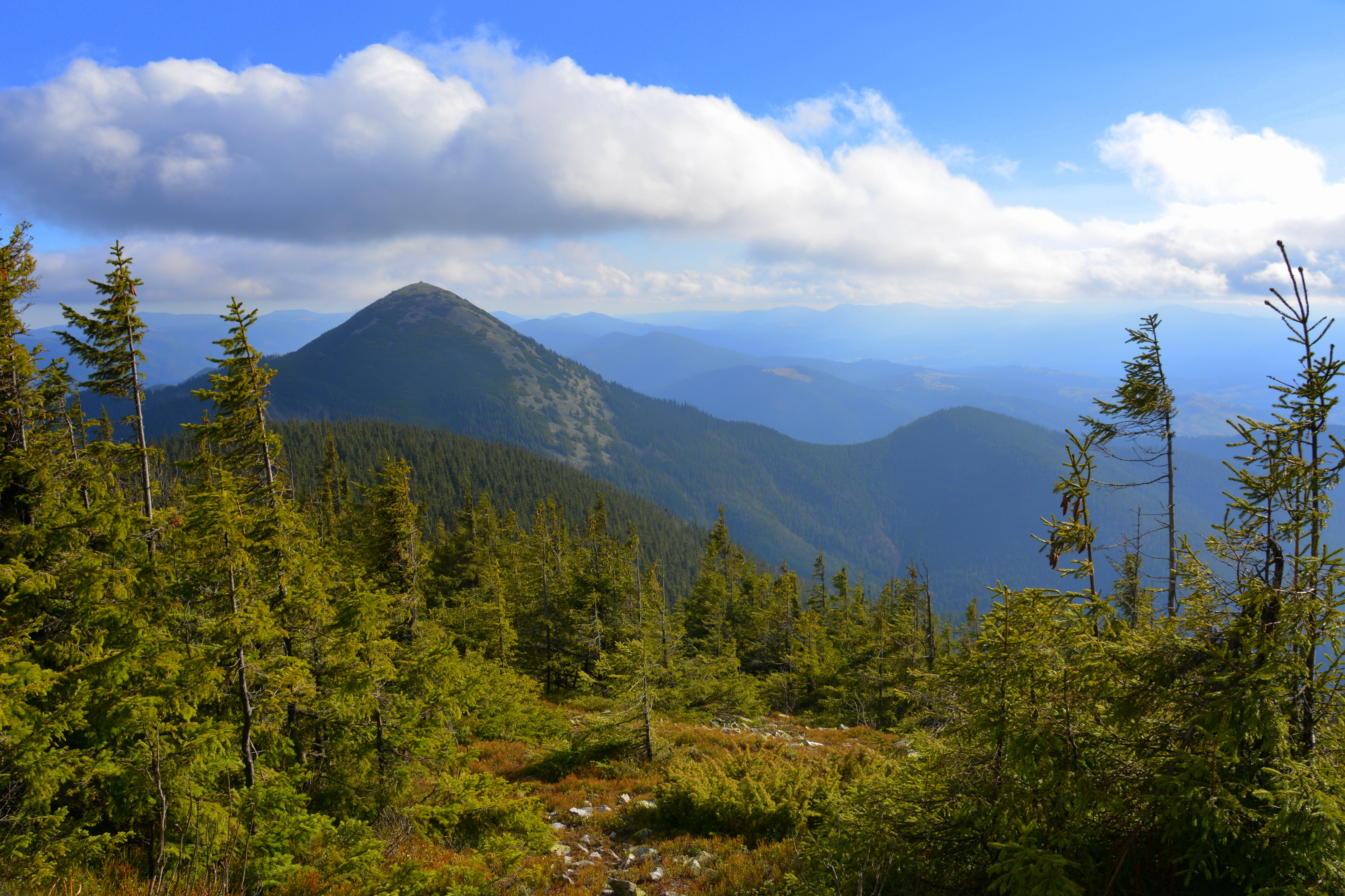 «Горгани», Надвірнянський район, Бистрицька та Зеленська сільські ради